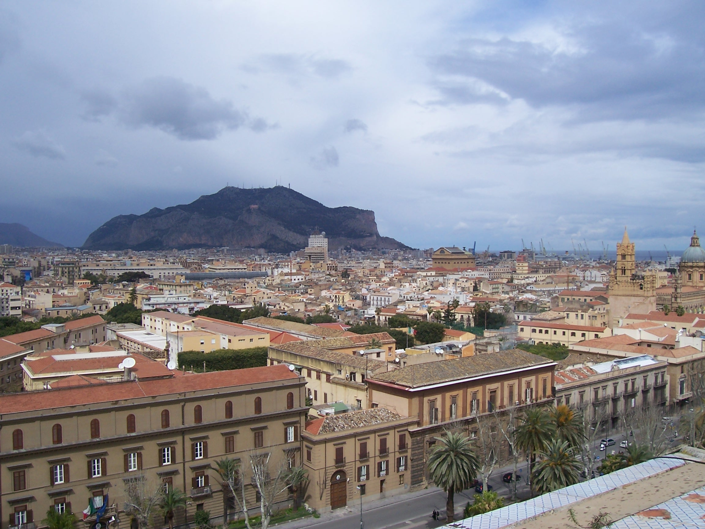 Monte Pellegrino e via Vittorio Emanuele da Palazzo dei Normanni